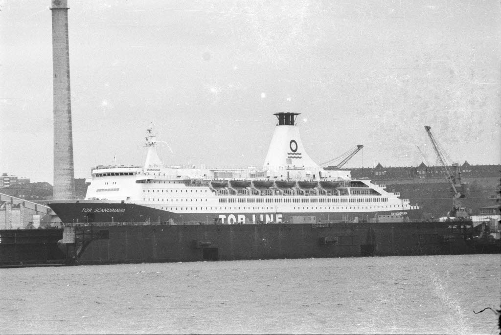 im Schwimmdock vor Werk Dietrichsdorf der Howaldtswerke Deutsche Werft AG (HDW).